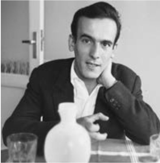 Foto: Archivo Francisco Ontañón